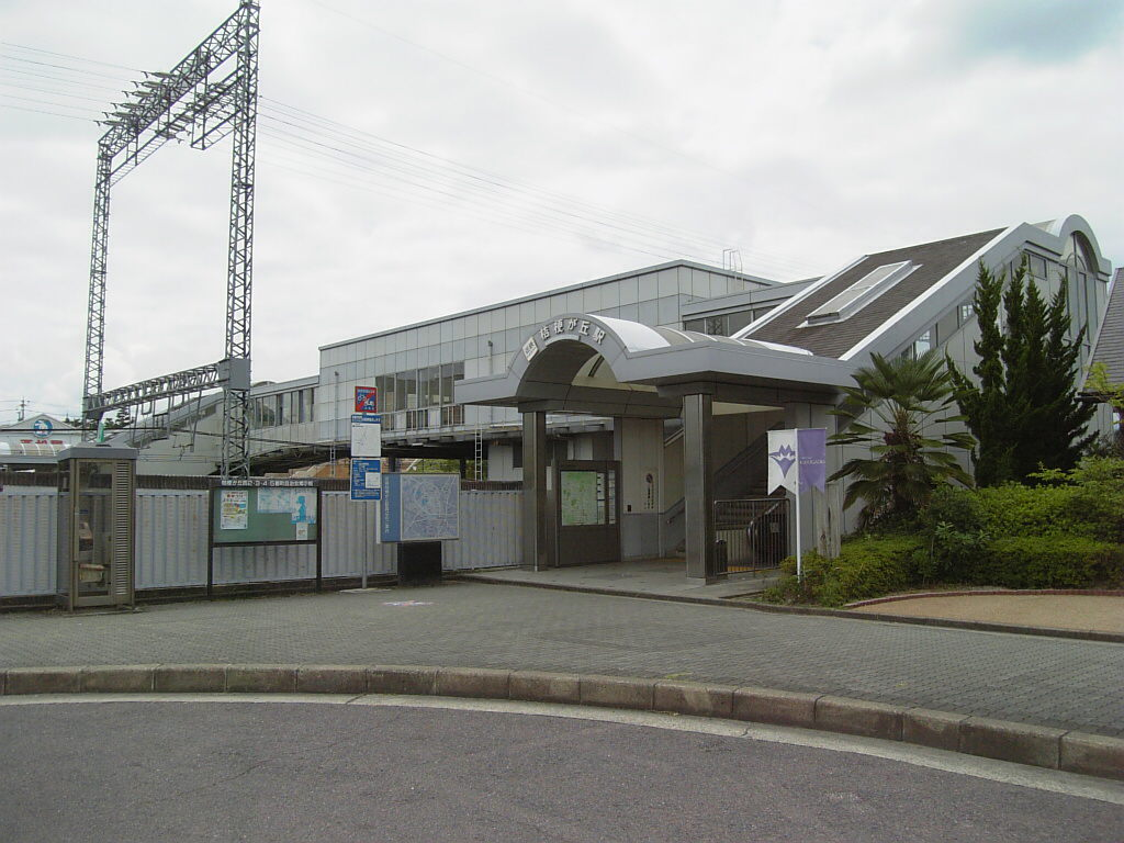 近鉄桔梗が丘駅（北側） 2007年8月撮影。 機材：V604SH 撮影者：Kansai explorer